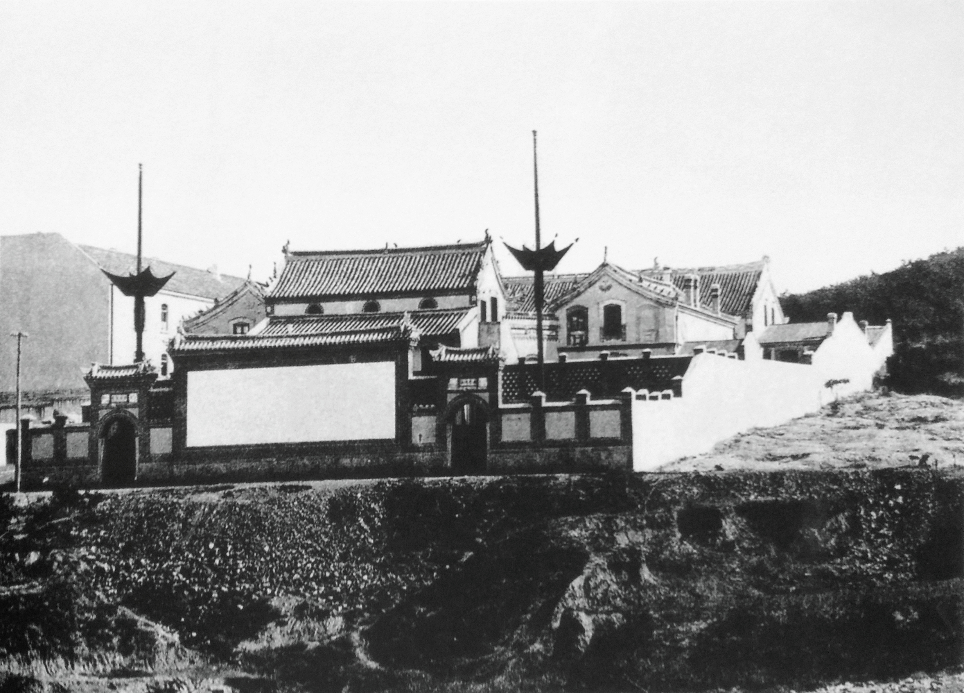 青岛三江会馆